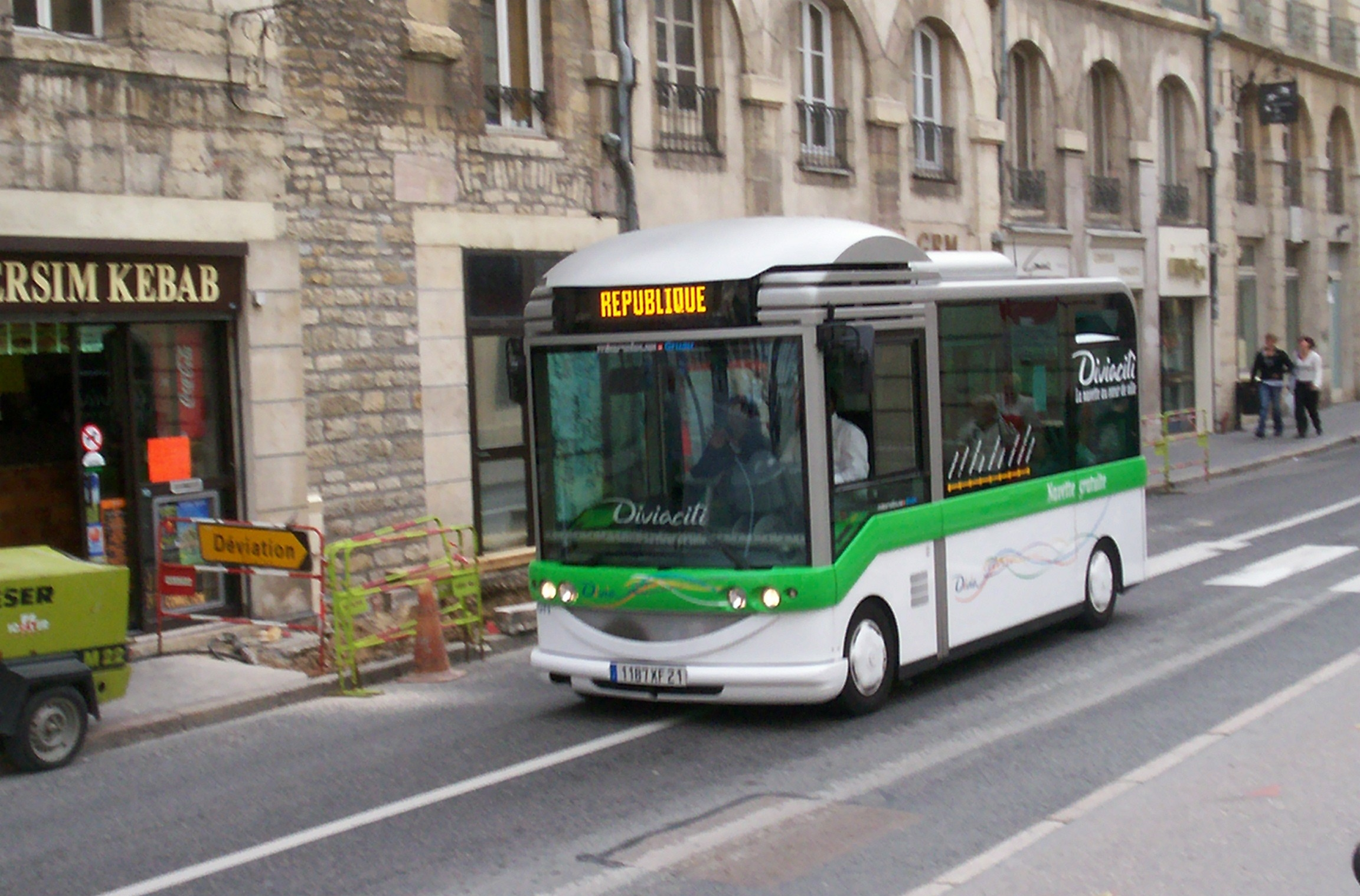 Gruau Microbus électrique sur la navette Diviaciti